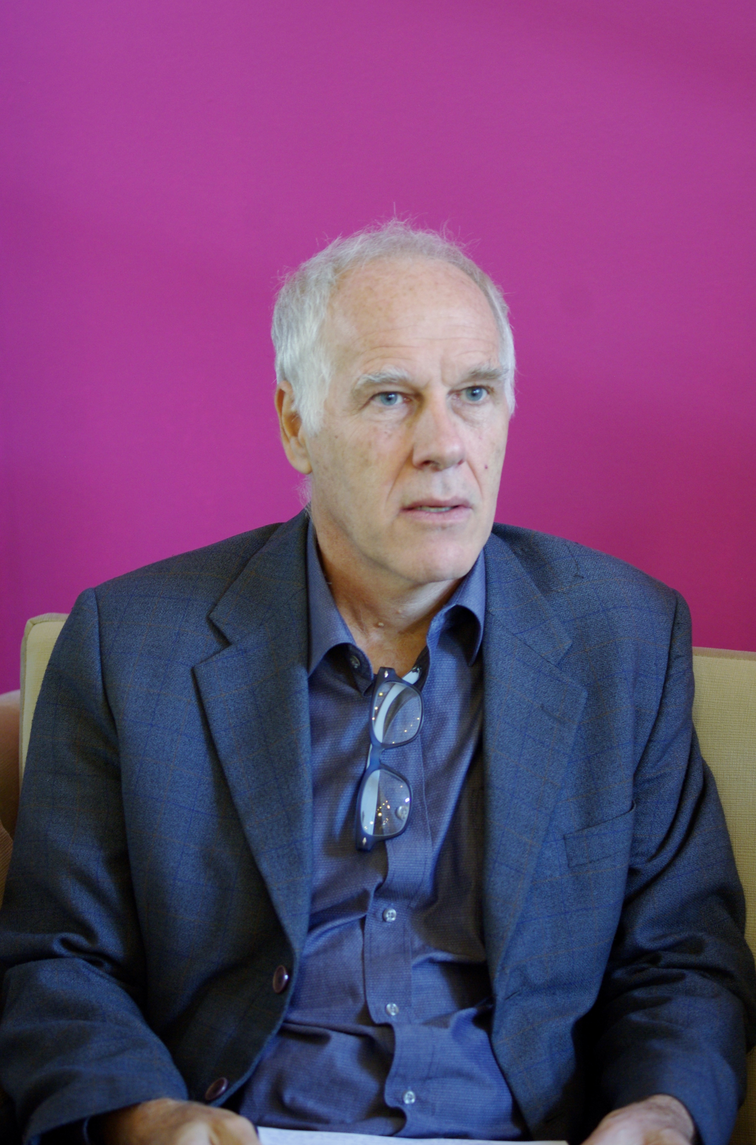 El sociólogo y político chileno José Weinstein durante la presentación del libro Se puede. 10 experiencias de inclusión, desarrollo de habilidades y educación integral hoy, de la Agencia de Calidad de la Educación, en la Feria Internacional del Libro de Santiago. Sala Lily Garafulic del Centro Cultural Estación Mapocho, 28.10.2016